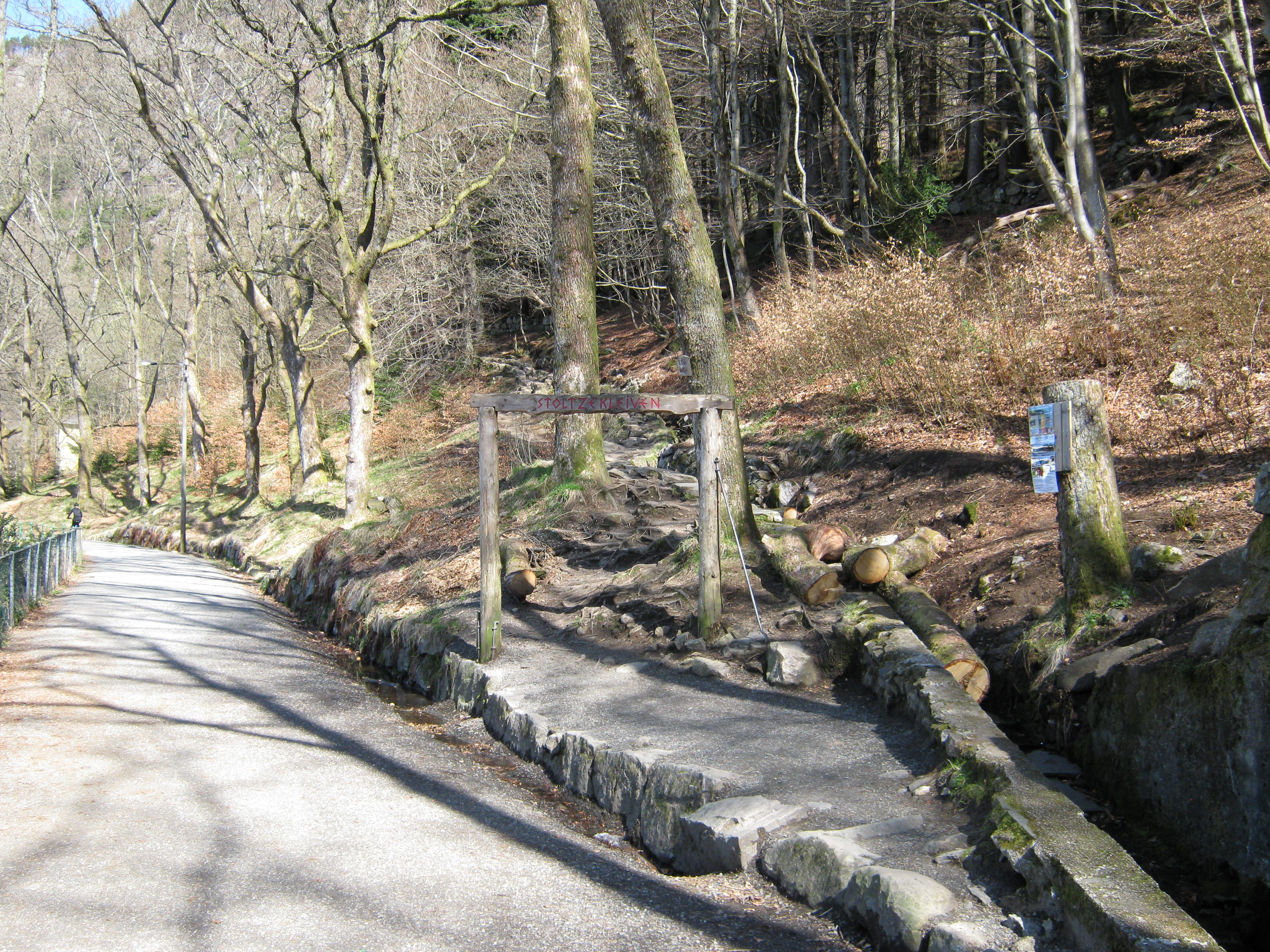 Stoltzekleiven, start i Fjellveien i Sandviken.